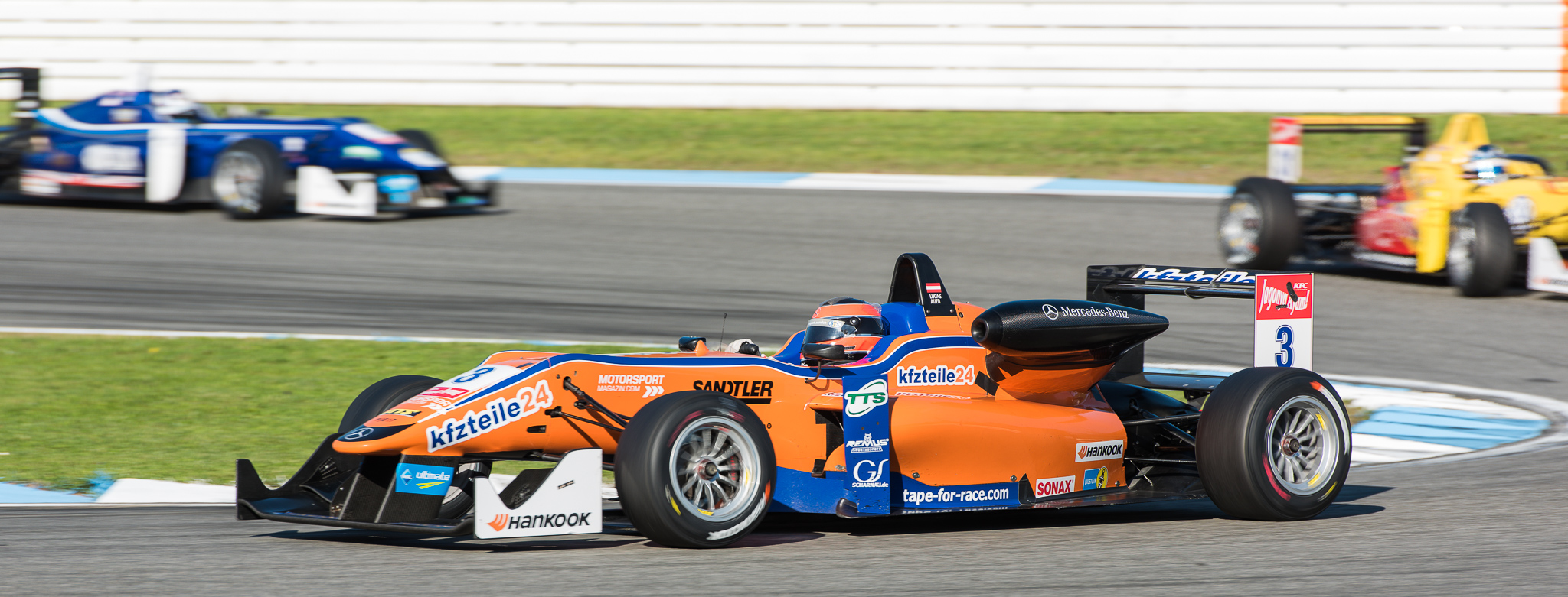 DTM,Dallara F312,Deutsche Tourenwagen Masters,F3 FIA European Championship,FIA Formel 3 Europameisterschaft,Hockenheimring,Lucas Auer,Mercedes-Benz,Motorsport,Mücke Motorsport,kfzteile24